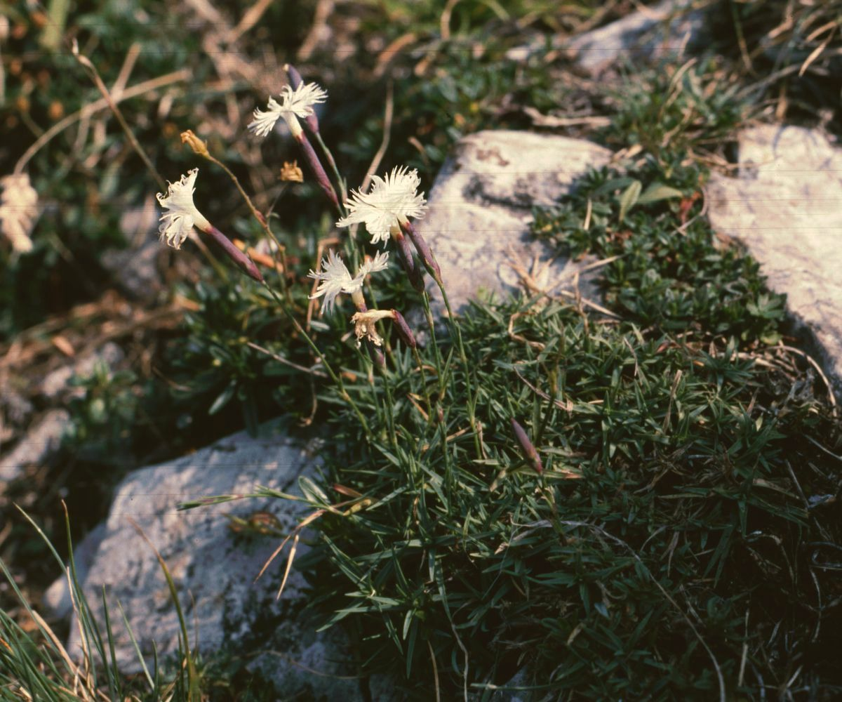 Dianthus petraeus, Nelkengewächse (Caryophyllaceae) - Rumänien/România: Südkarpaten, Retezatgebirge, Piatra Iorgovanului, Kalk, ca. 1600 m Seehöhe